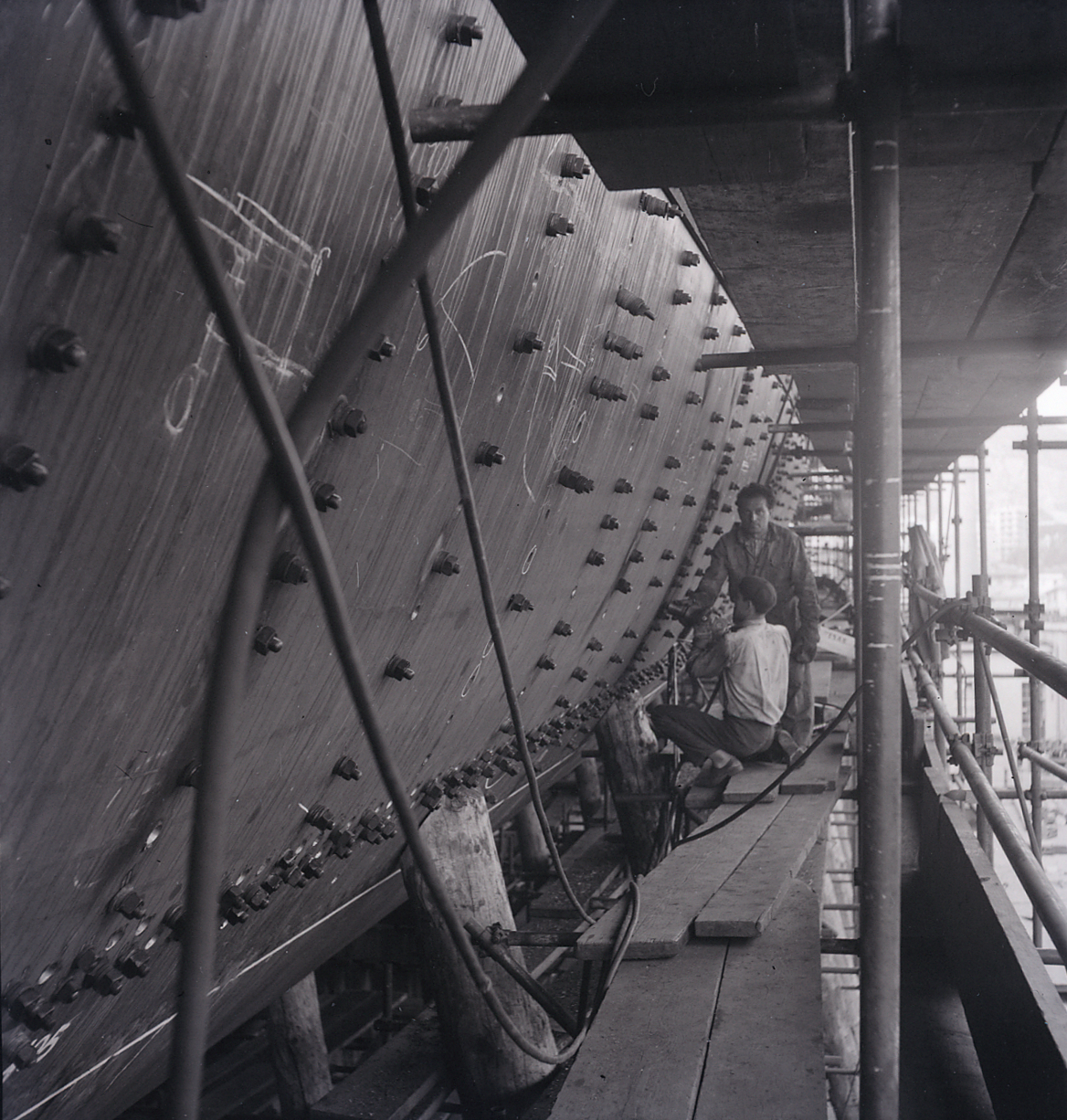 Servizio fotografico : Genova, 1965 / Paolo Monti. - Buste: 6, Fototipi: 6 : Negativo b/n, gelatina bromuro d'argento/ pellicola ; 6x6. - ((Serie costituita da 6 negativi identificati con i nn.: 9086-90941. Numerazione parallela: 1-6. Sulla busta R9086 manoscritto: "Cantiere Ansaldo". La suddetta serie è contenuta nella scatola identificata con la numerazione R8801/9173. Sul coperchio iscrizione manoscritta a pennarello: "Genova".